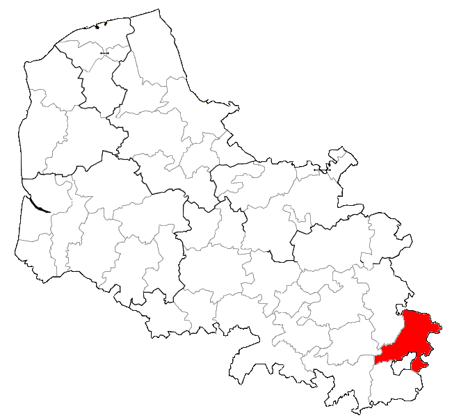 Localisation de la CCM dans le Pas-de-Calais.